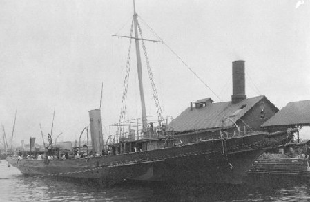 USS Hornet, crucero auxiliar estadounidense de finales del s.XIX